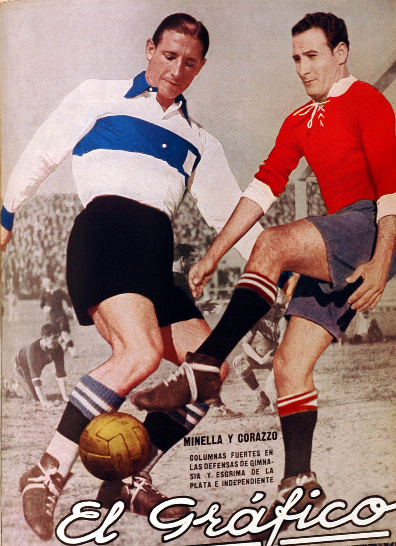 El Grafico del 13 de Mayo de 1933. Edicion 722